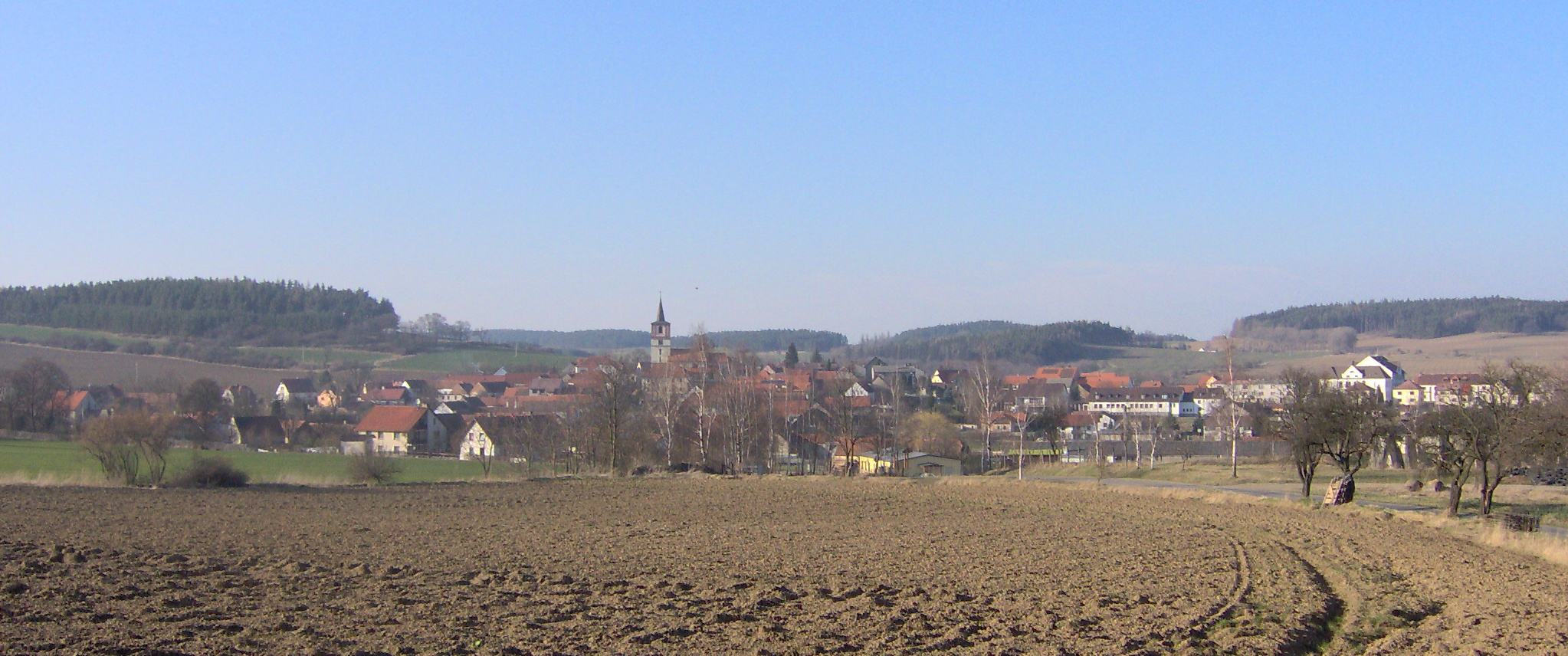 A view of Volenice (district Strakonice) - pohled na Volenice v okrese Strakonice